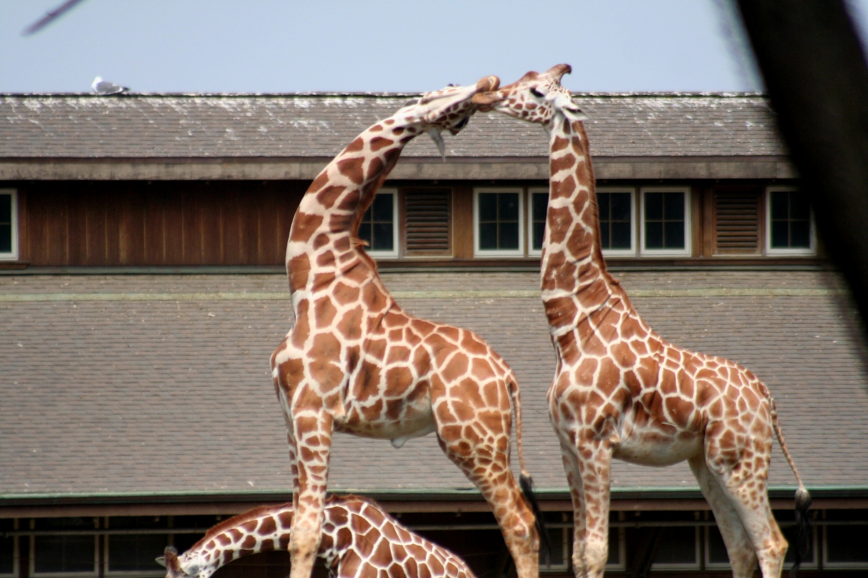 Giraffes at San Francisco ZOO